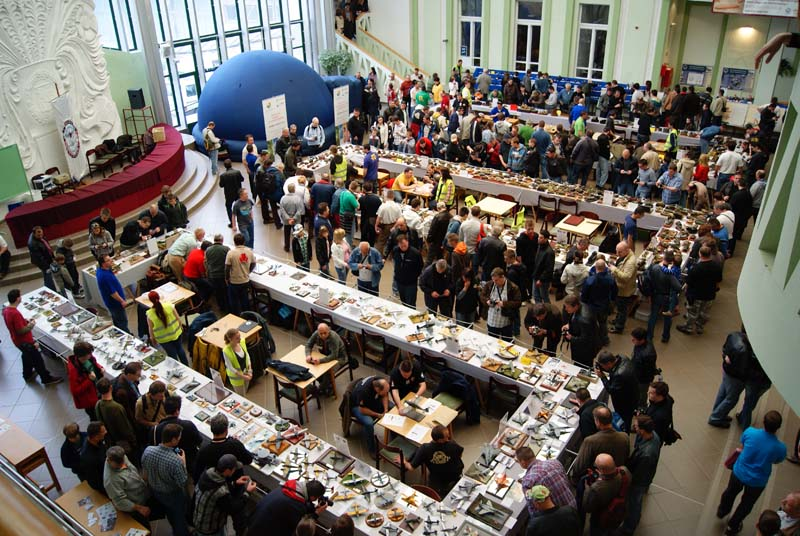 Moson Model Show